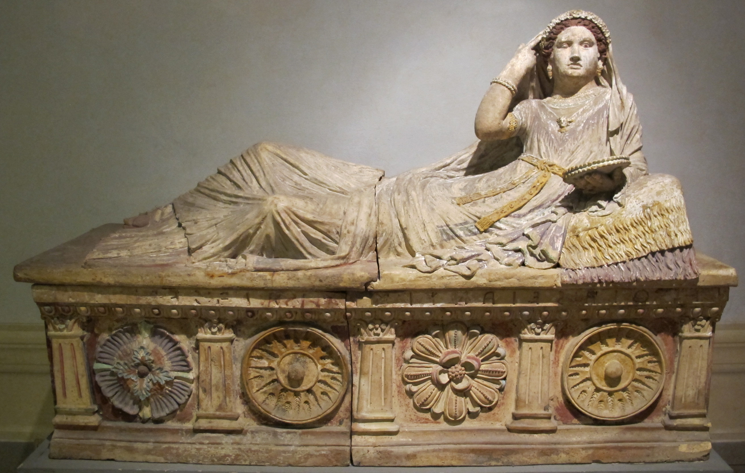 Sarcofago di larthia seianti